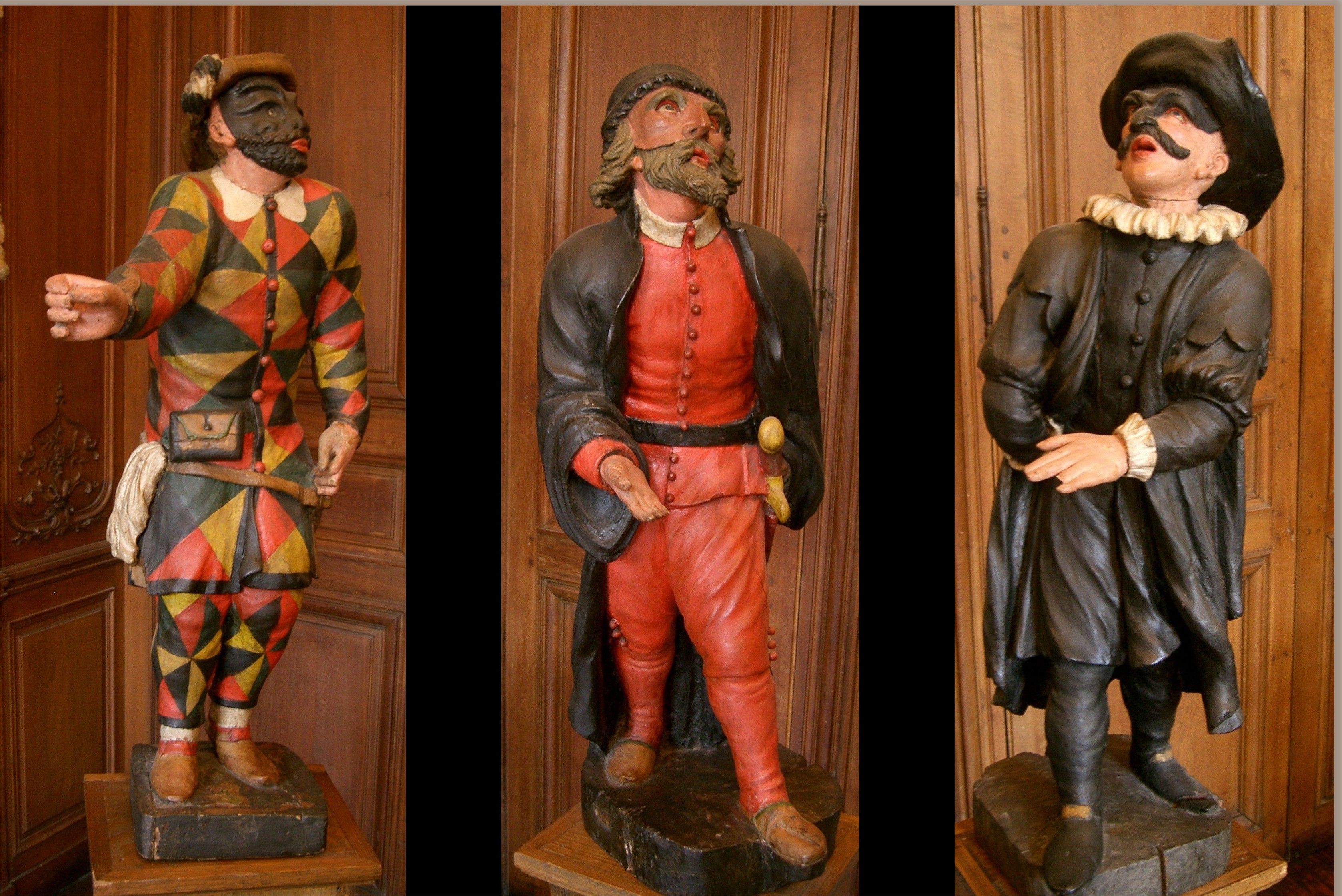 Personnages de la commedia dell'arte. Petites statues en plâtre peint (environ 100 cm) provenant du Théâtre Séraphin installé au Palais-Royal à la fin du XVIIIe siècle et conservées au musée Carnavalet à Paris (série de quatre pièces : Arlequin – Pantalone – Il Dottore – Brighella).